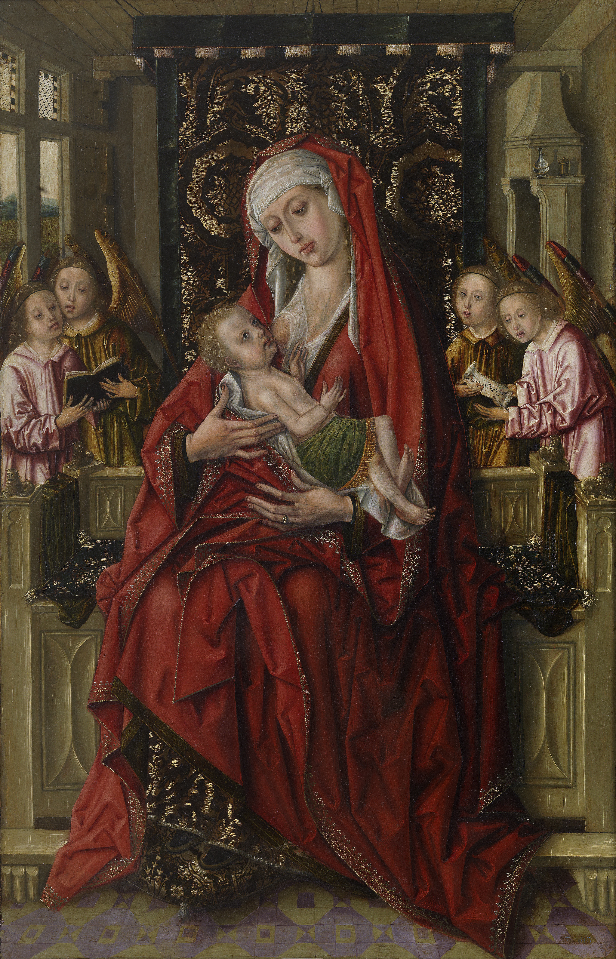 La obra representa a la Virgen María amamantando a su hijo, el Niño Jesús.